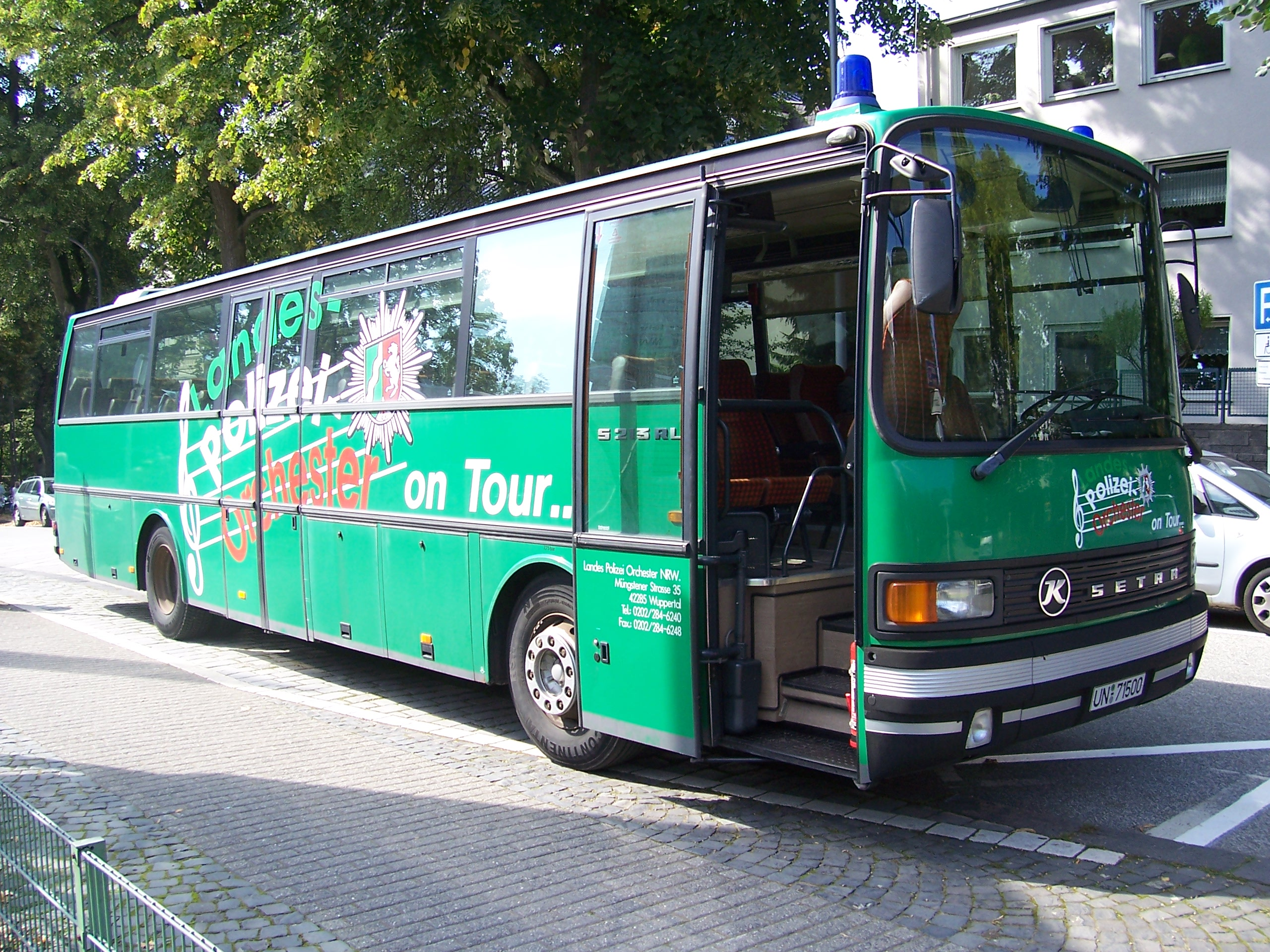 Ein Setra S 213 RL des Landes Polizei Orchesters NRW. Fotografiert in Wuppertal.